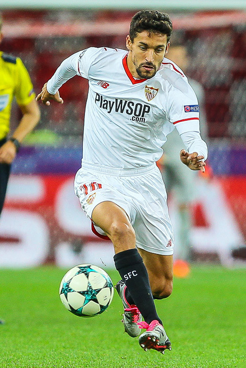 «Спартак» - «Севилья»